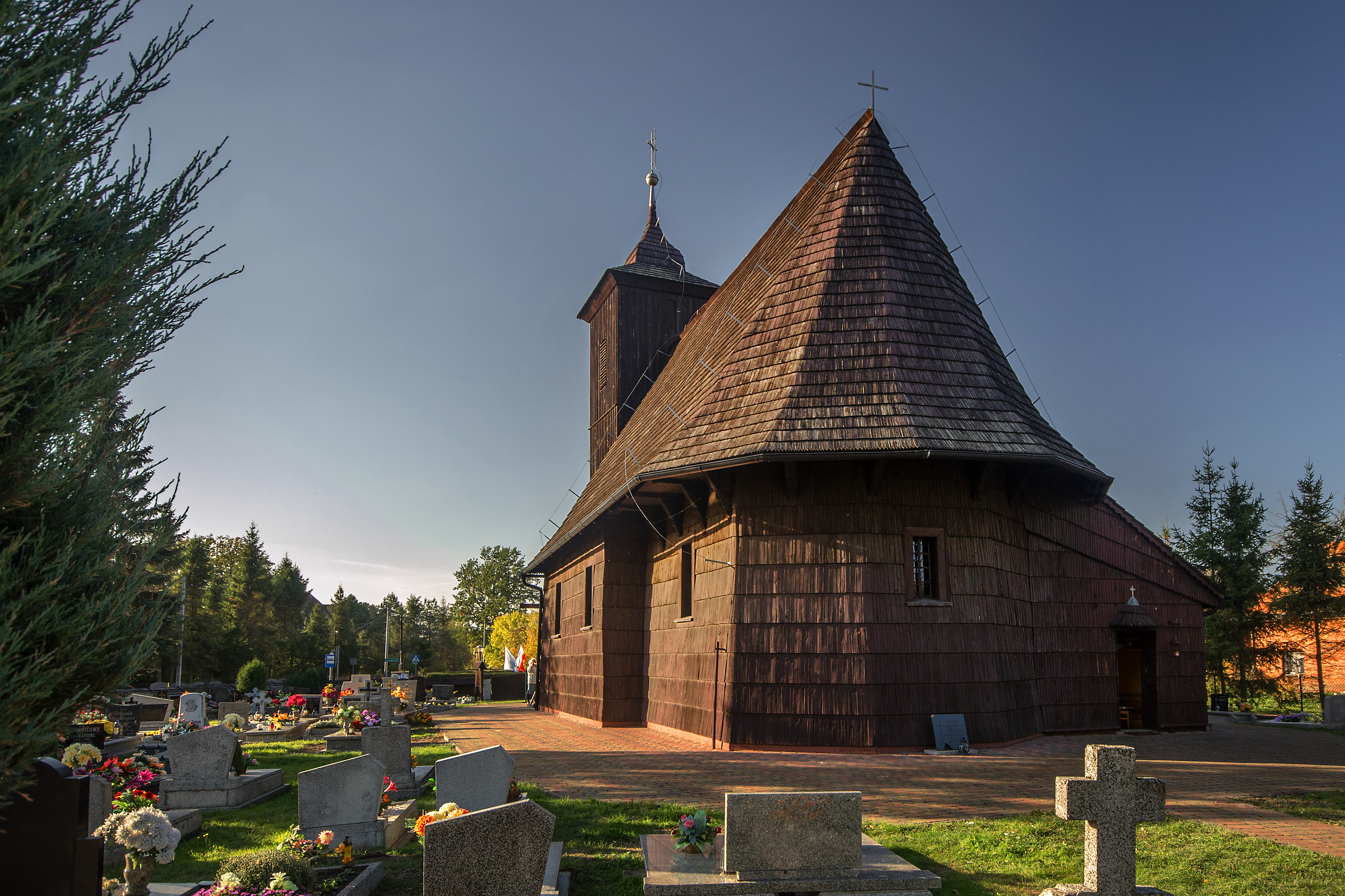 Lasowice Wielkie, kościół par. p.w. Wszystkich Świętych, 1599